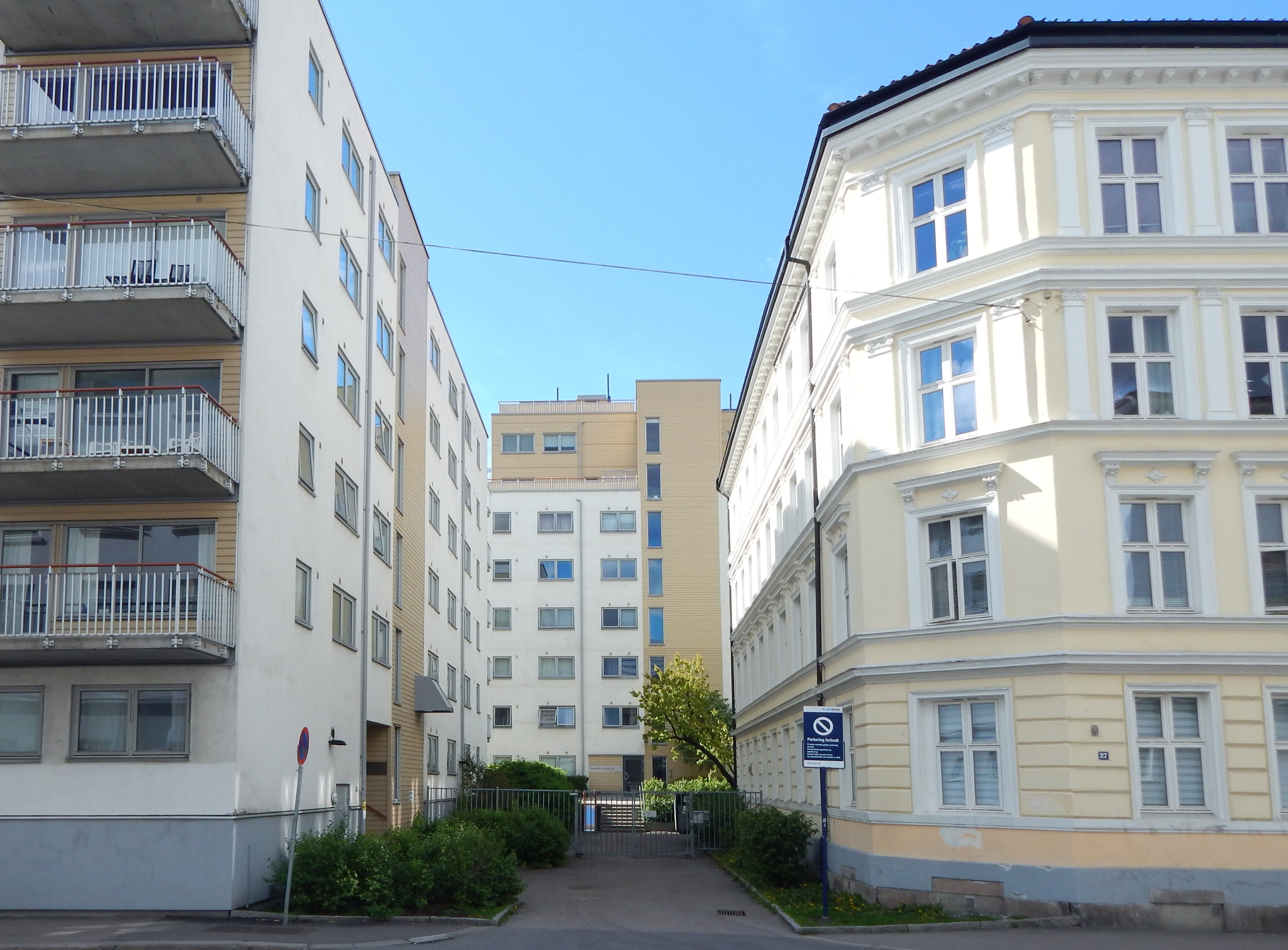 Stiklestadgata på Grønland